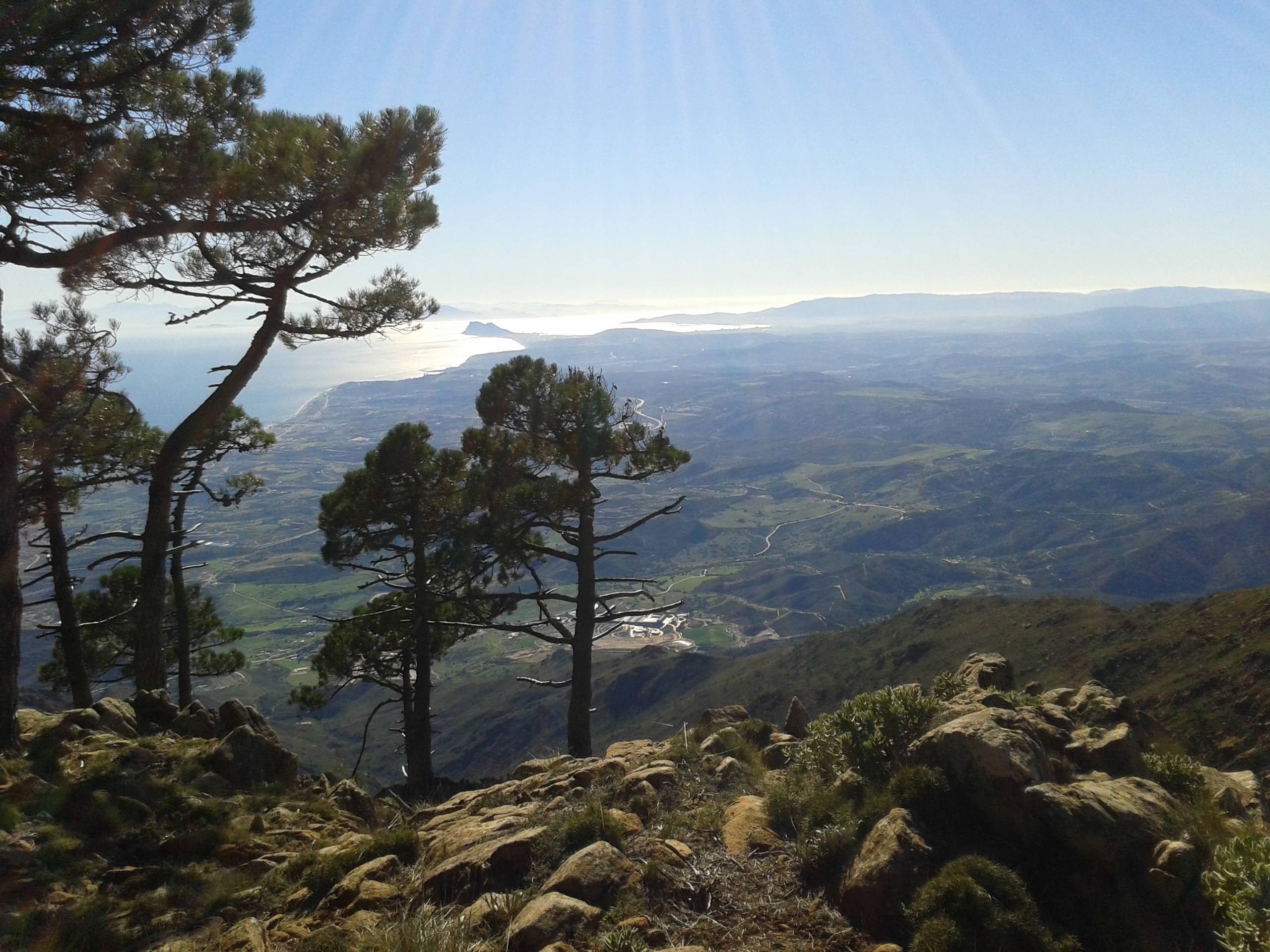 Los Reales de Sierra Bermeja This is a photography of a Site of Community Importance in Spain with the ID: ES6170004. Natura2000 entry, EEA entry